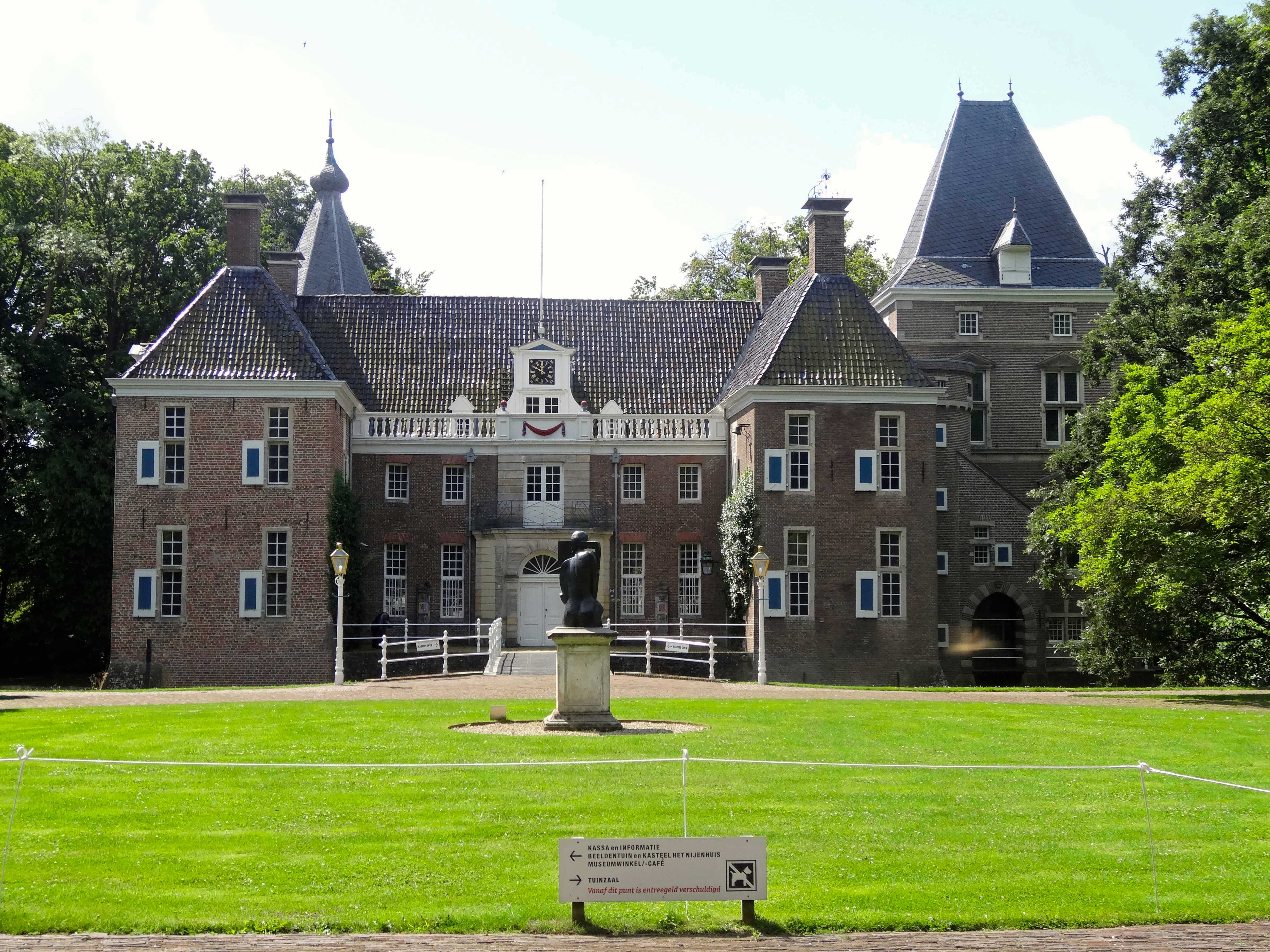 Het Nijenhuis in de gemeente Olst-Wijhe, nabij Heino in de gemeente Raalte